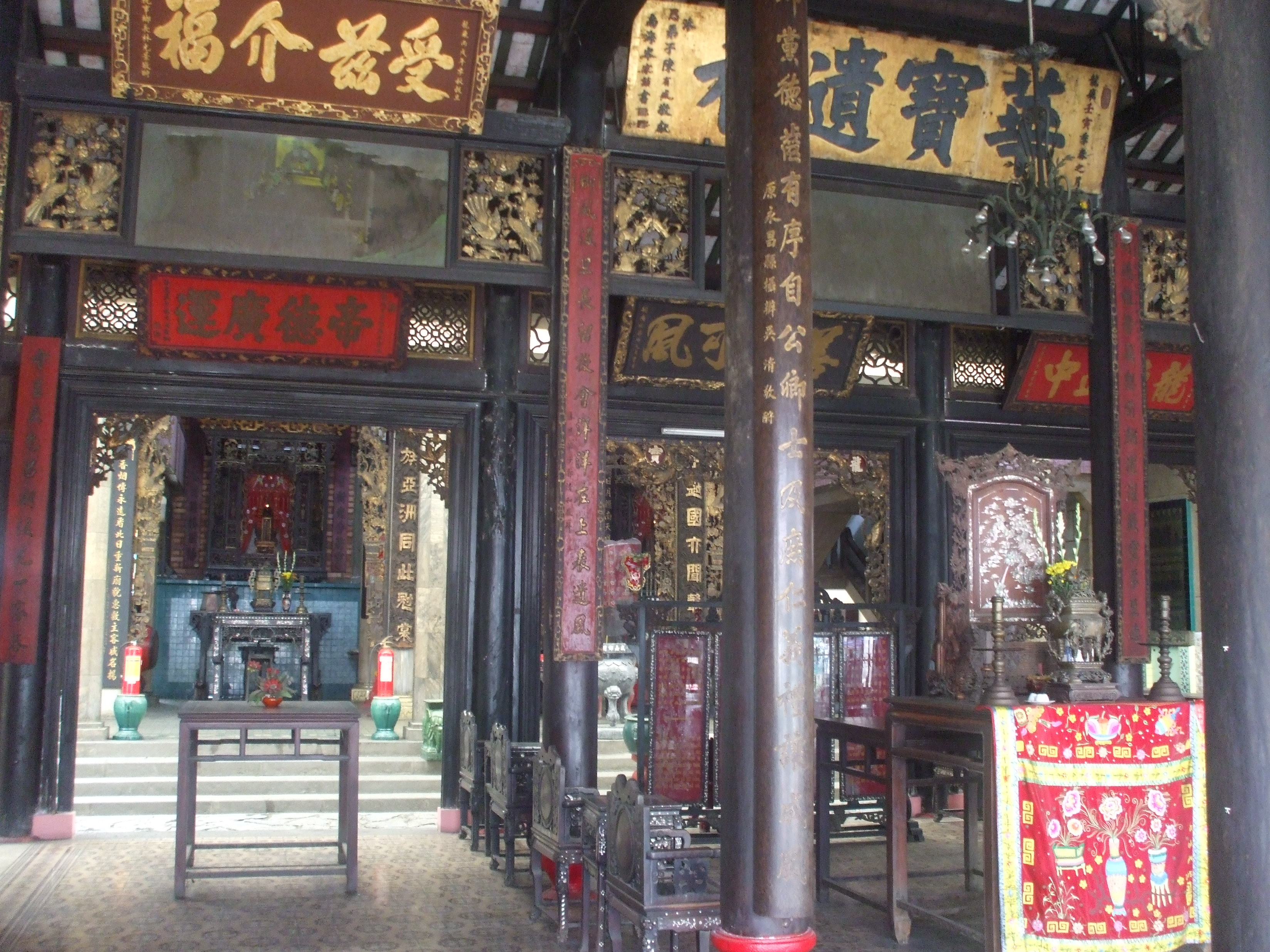 Chính điện Đình Minh Hương Gia Thạnh.